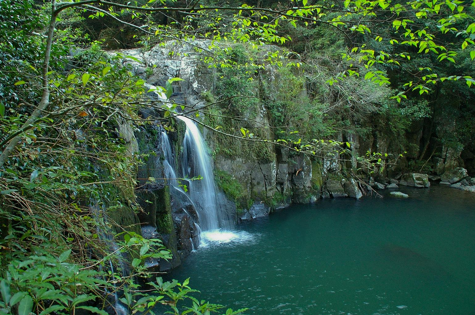 千綿渓 龍頭泉 呑空淵